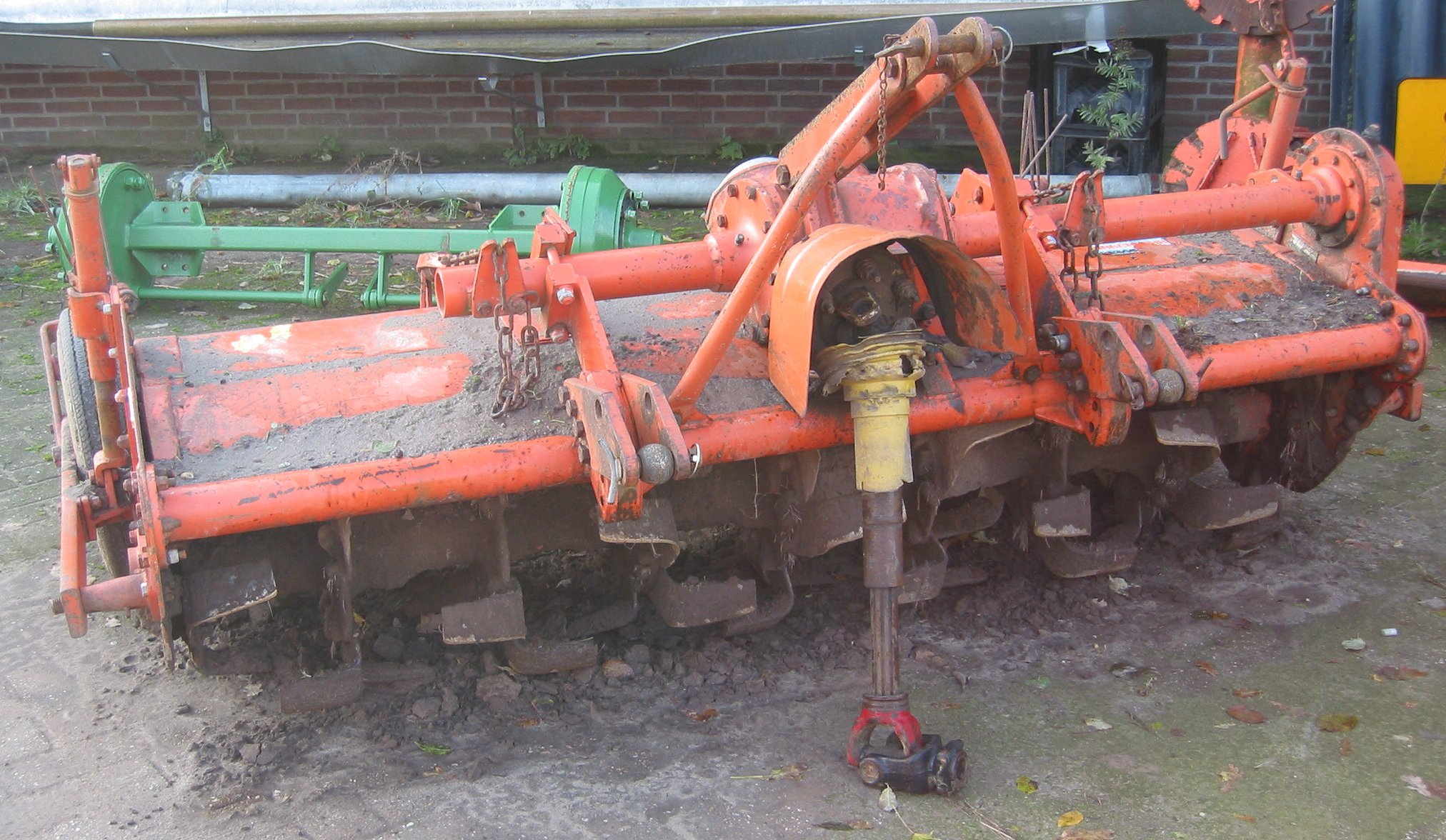 Grondfrees met messen voor achter een tractor